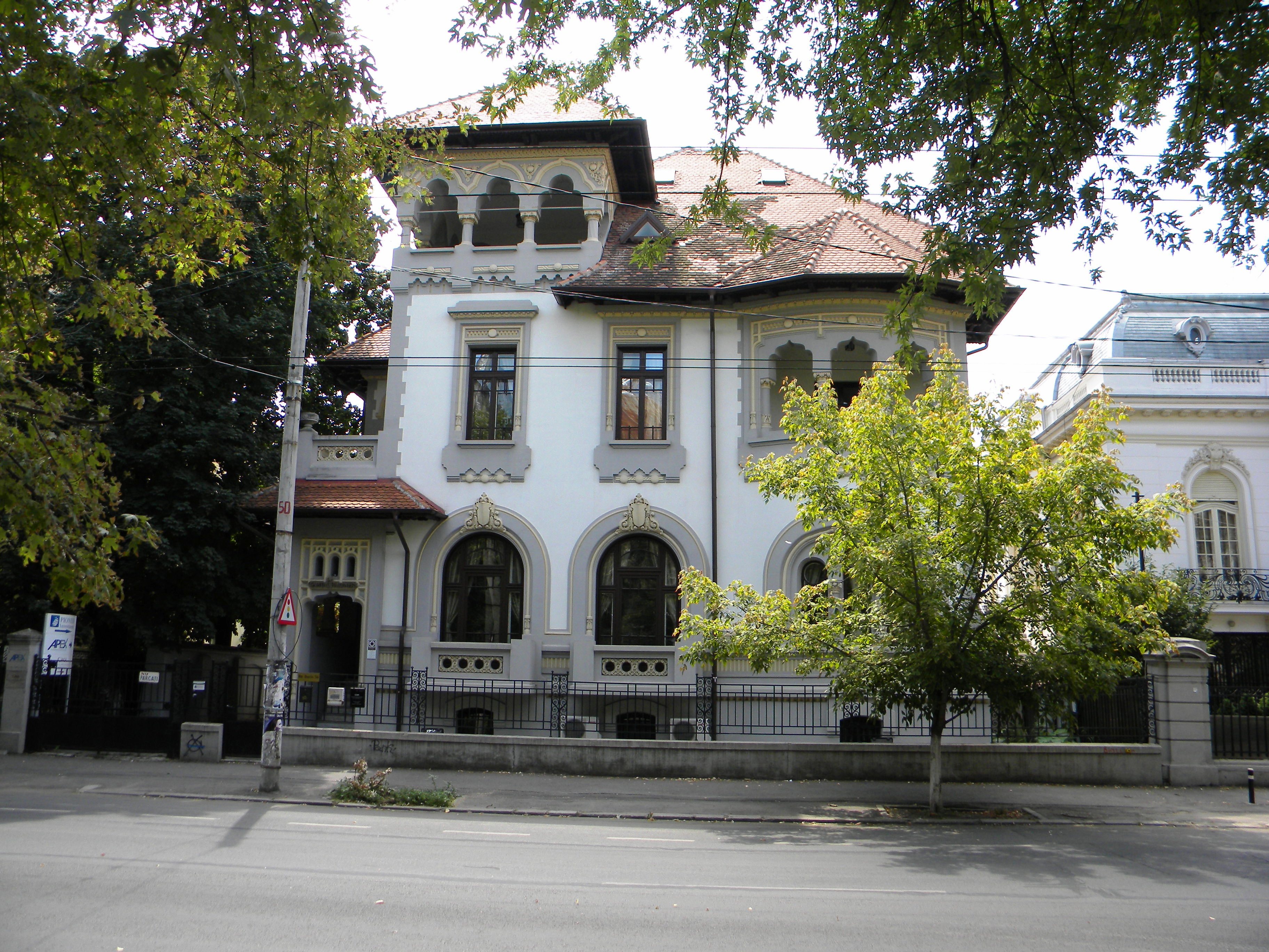 Casa pe Bd. Dacia, nr. 56, Bucuresti, sect. 1